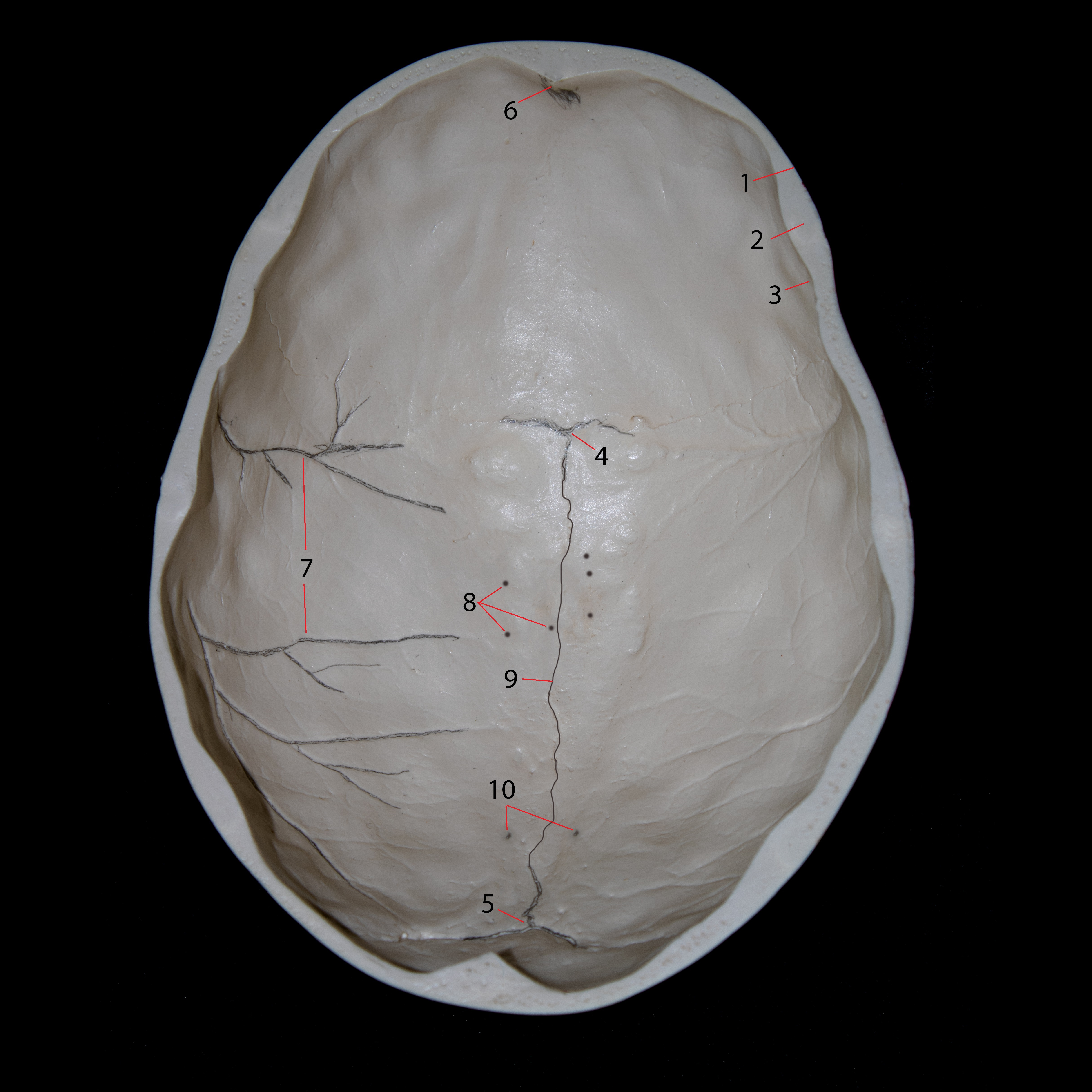 Θόλος του κρανίου με τονισμένα σημεία και αριθμούς